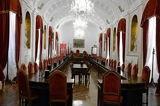 Municipio di Sassari